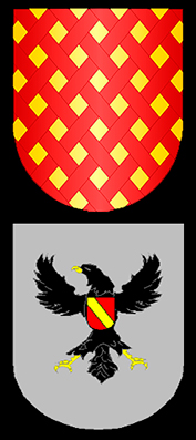 Heráldica de los Correa - Currea. Edición fotográfica en base al libro de alberto carrafa.